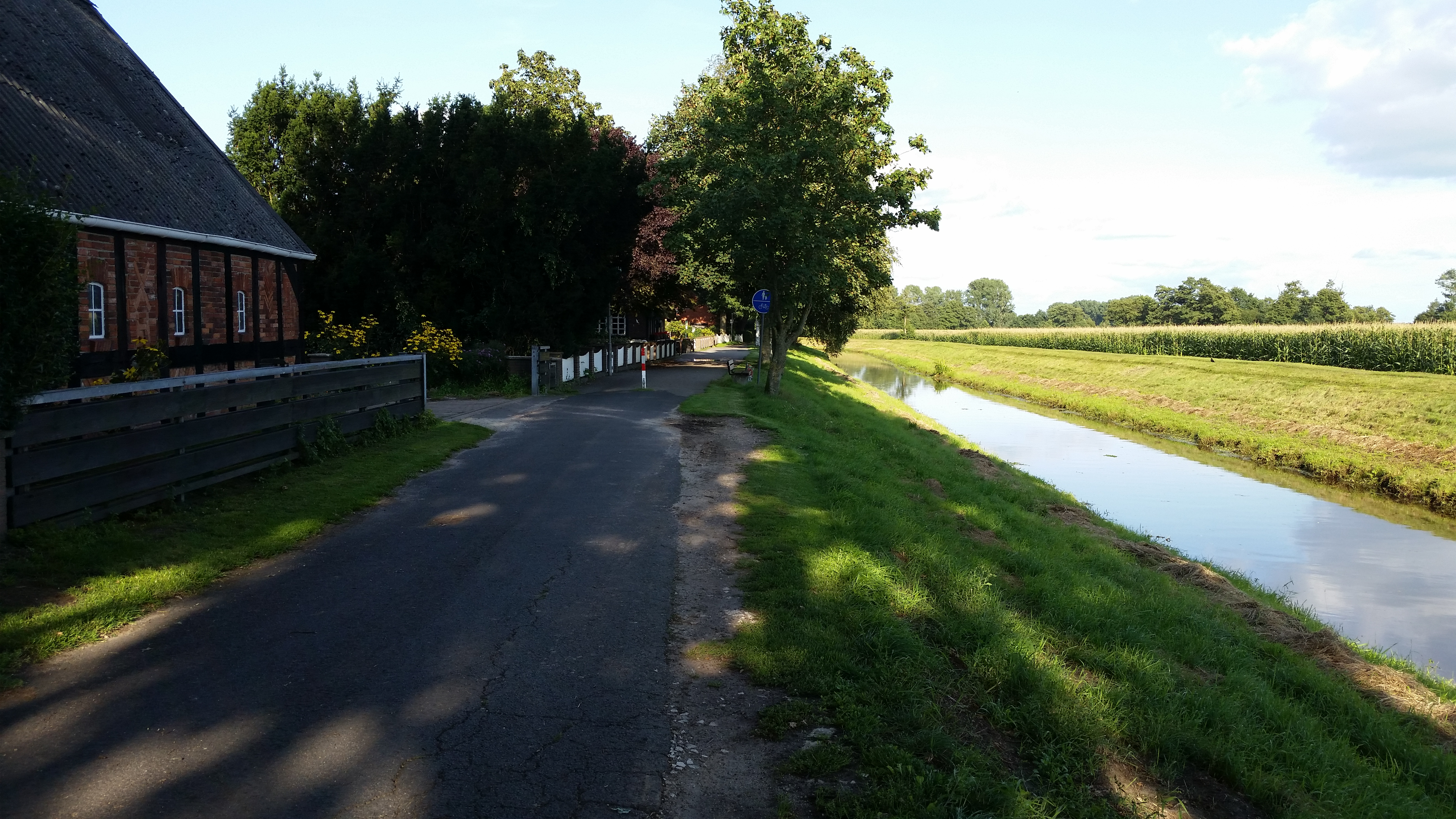 Die Wörpe in Lilienthal (Mühlendeich)